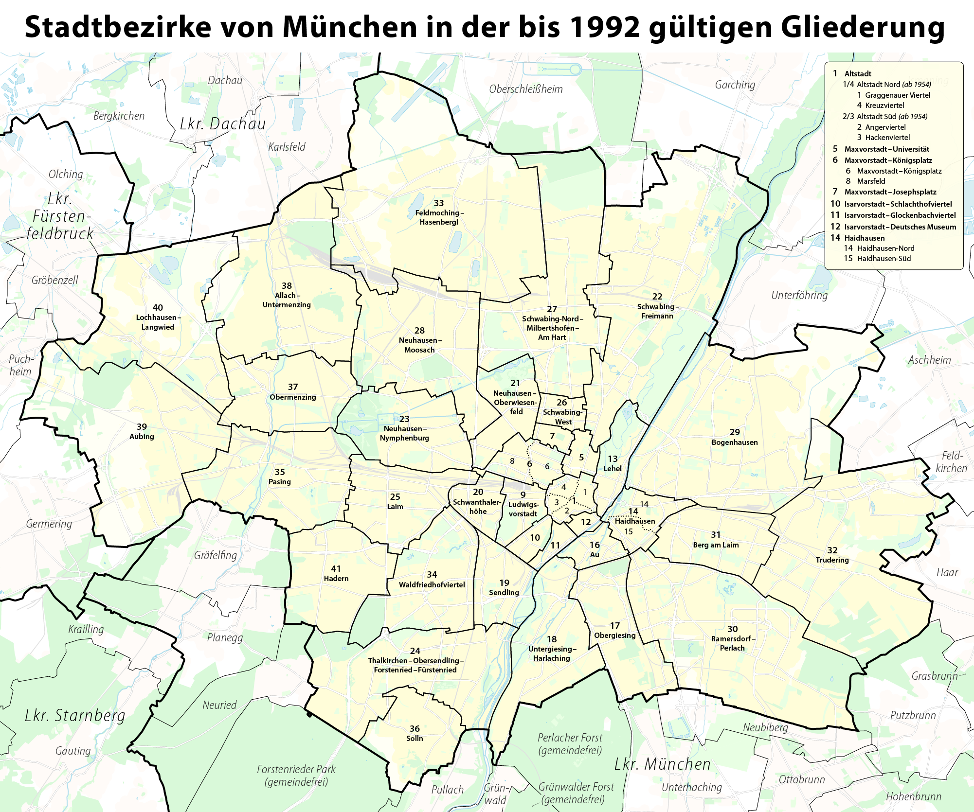 Karte der Stadtbezirke in München in der bis 1992 gültigen GliederungHinweis: Die dargestellten Grenzlinien können nur einen ungefähren Eindruck von deren tatsächlicher räumlichen Lage vermitteln. Für genauere Informationen deshalb bitte unbedingt die entsprechenden amtlichen Nachschlagewerke zu Rate ziehen!